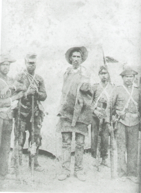 Guerra de Canudos, 1896-1897. Foto de Flávio de Barros, 1897.